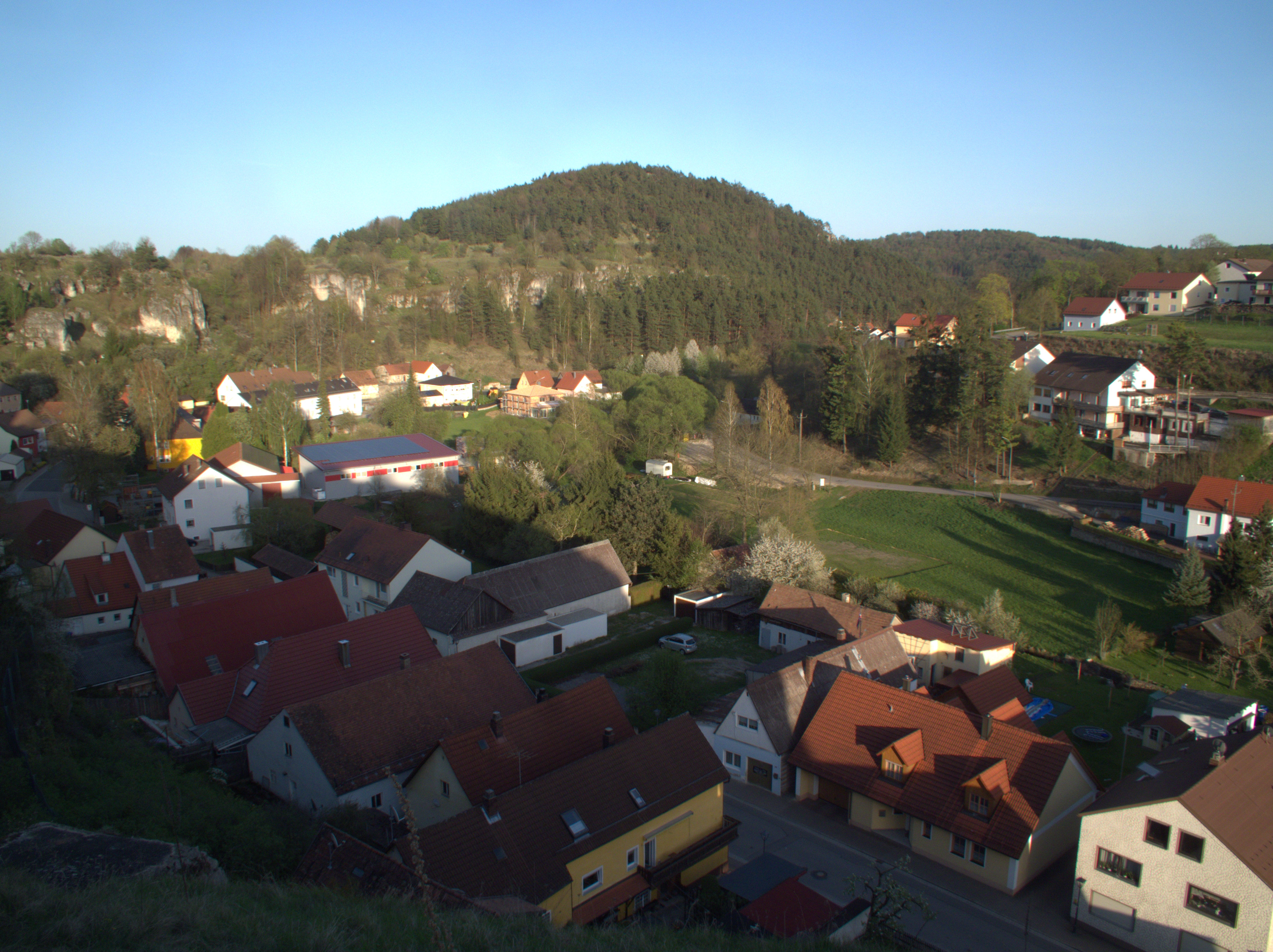 Markt Hohenfels in der Oberpfalz: Blick vom Burgberg